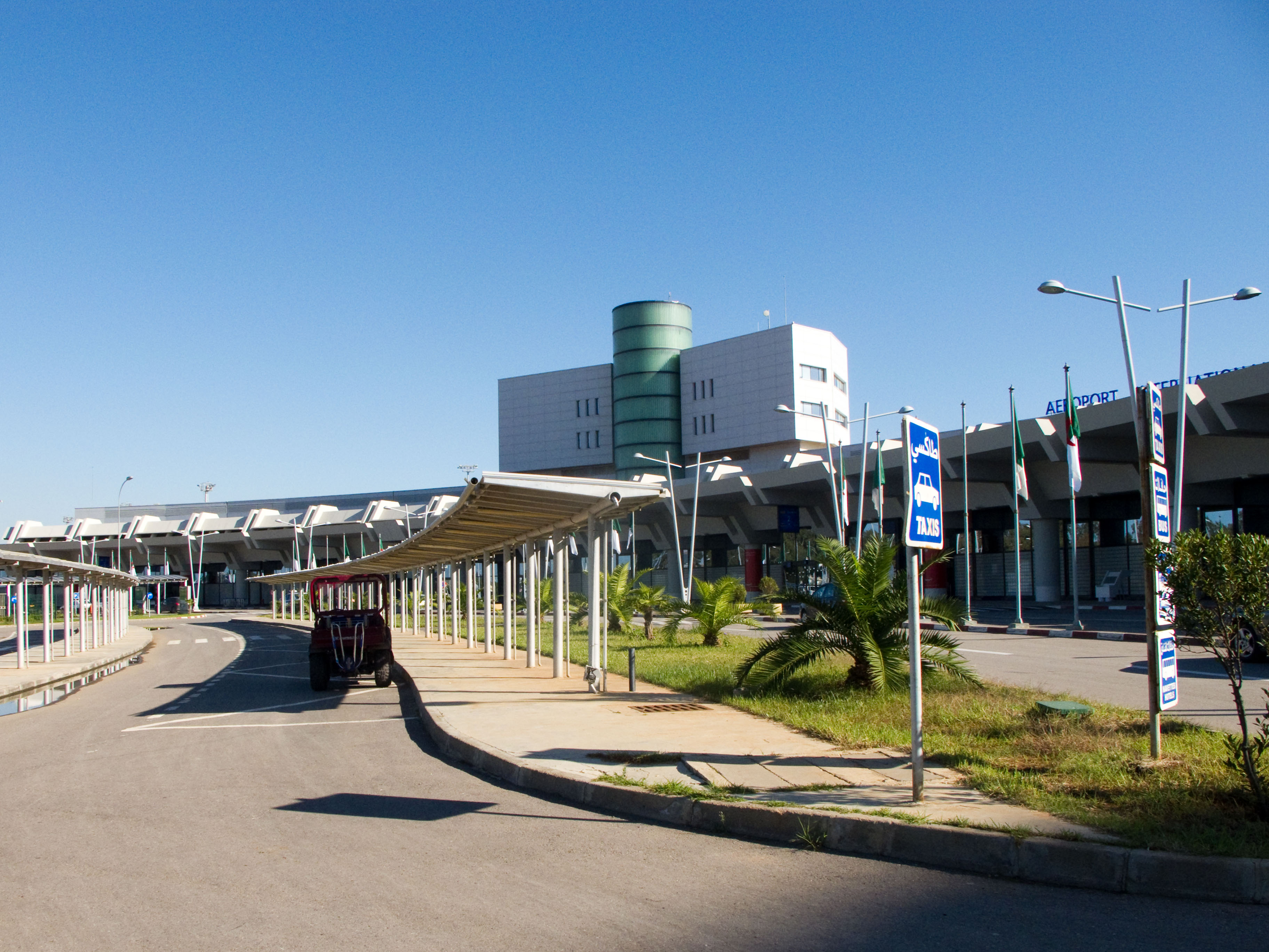 Aéroport Houari Boumediene, Dar El Beida, Alger, Algérie (nouvel aérogare)